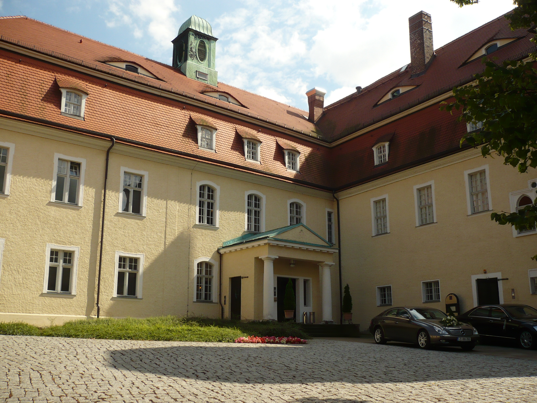 Dziedziniec zamku Schweinsburg w Neukirchen Pleiße